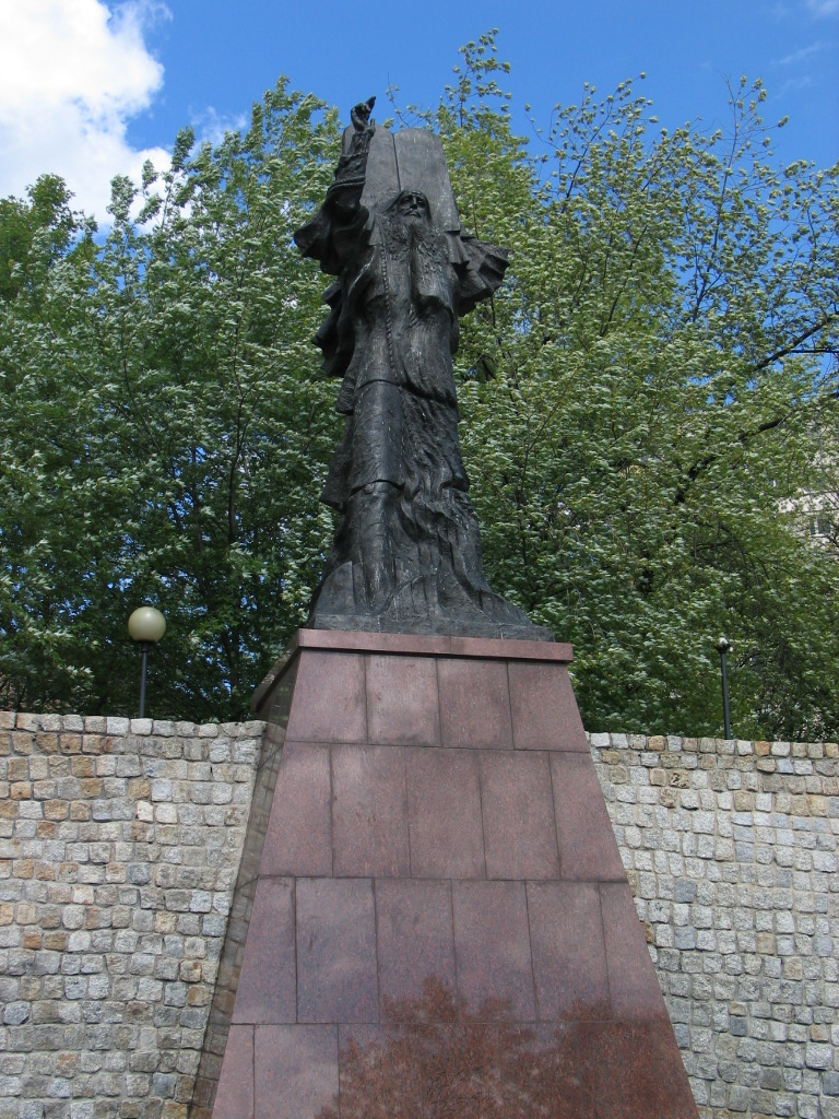 Pomnik Mojżesza w Parku Staromiejskim w Łodzi